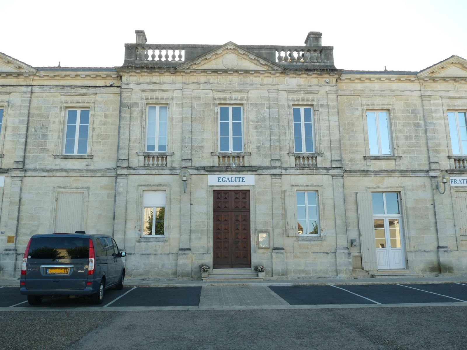 mairie de Mirambeau (17), France.